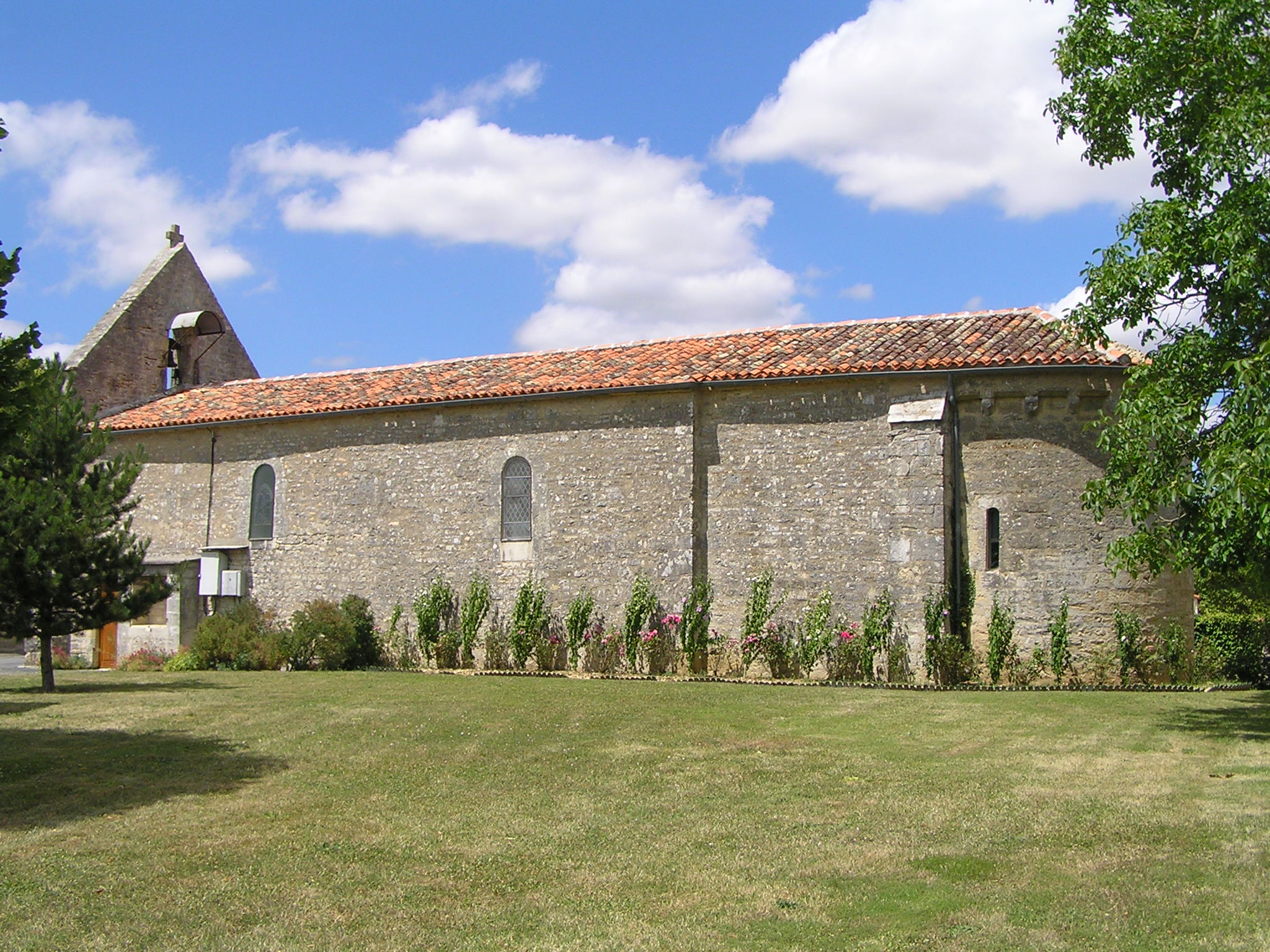 église de Lupsault